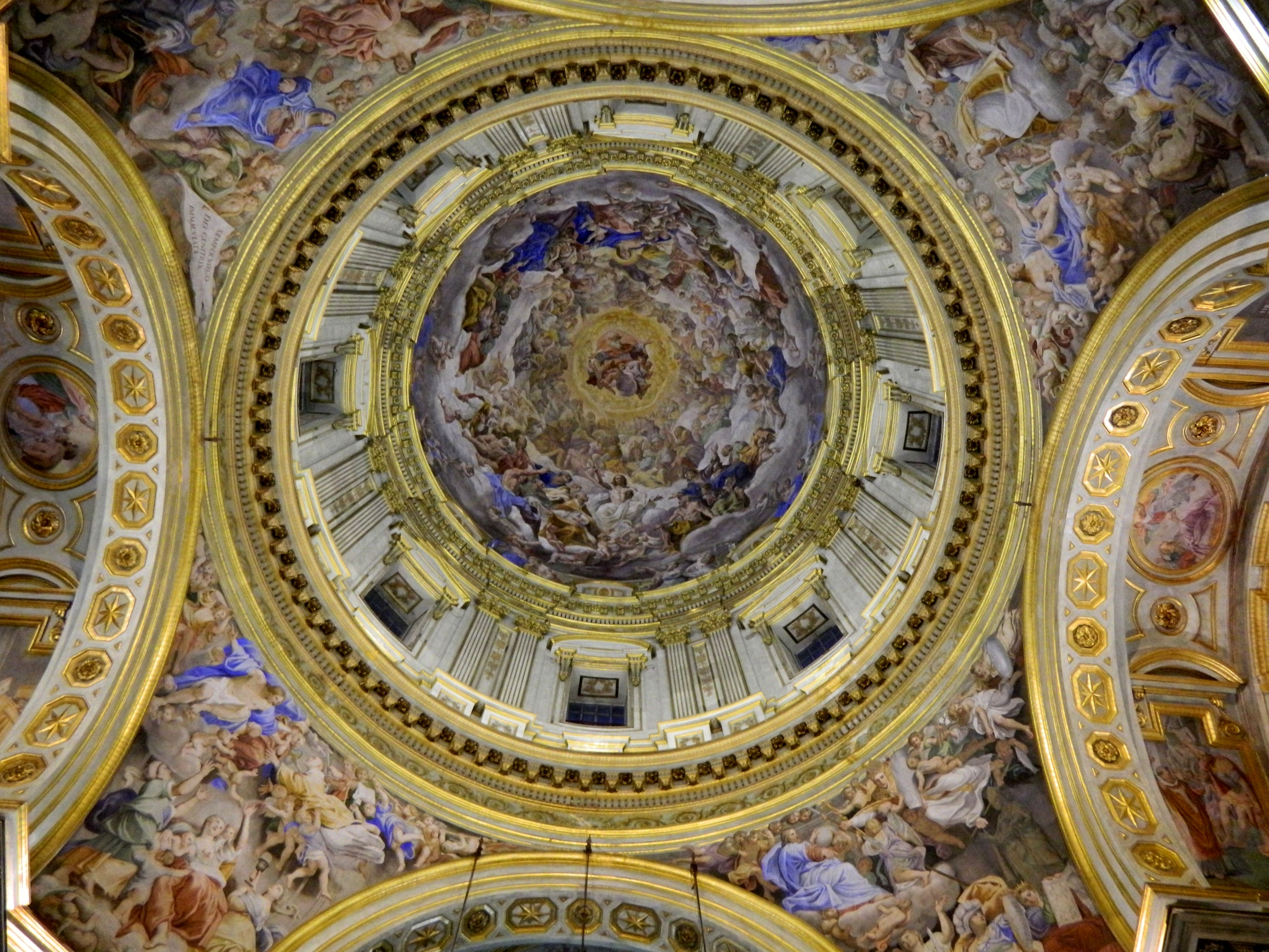 Cappella di San Gennaro (Duomo di Napoli) - Cupola del Lanfranco e pennacchi del Domenichino.